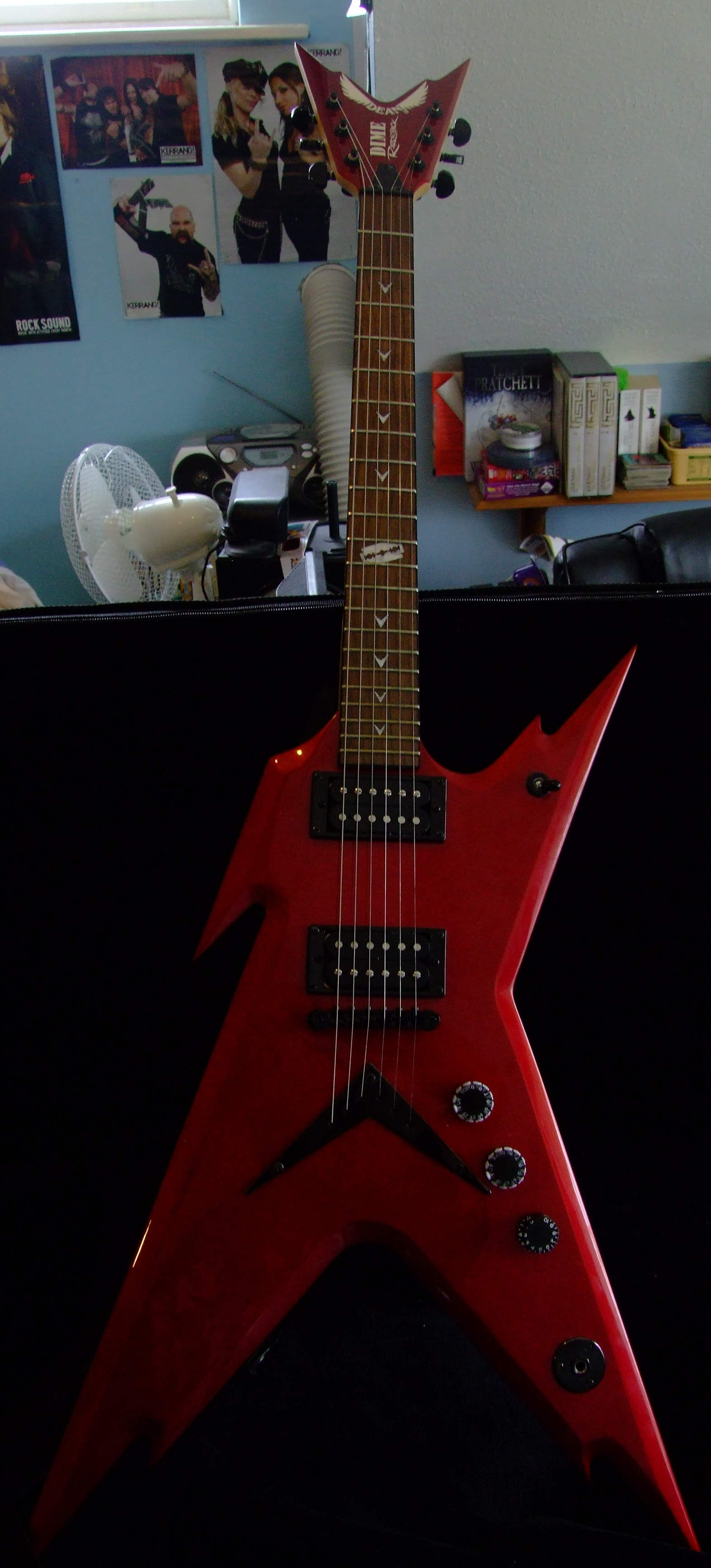 Dean Razorback guitar